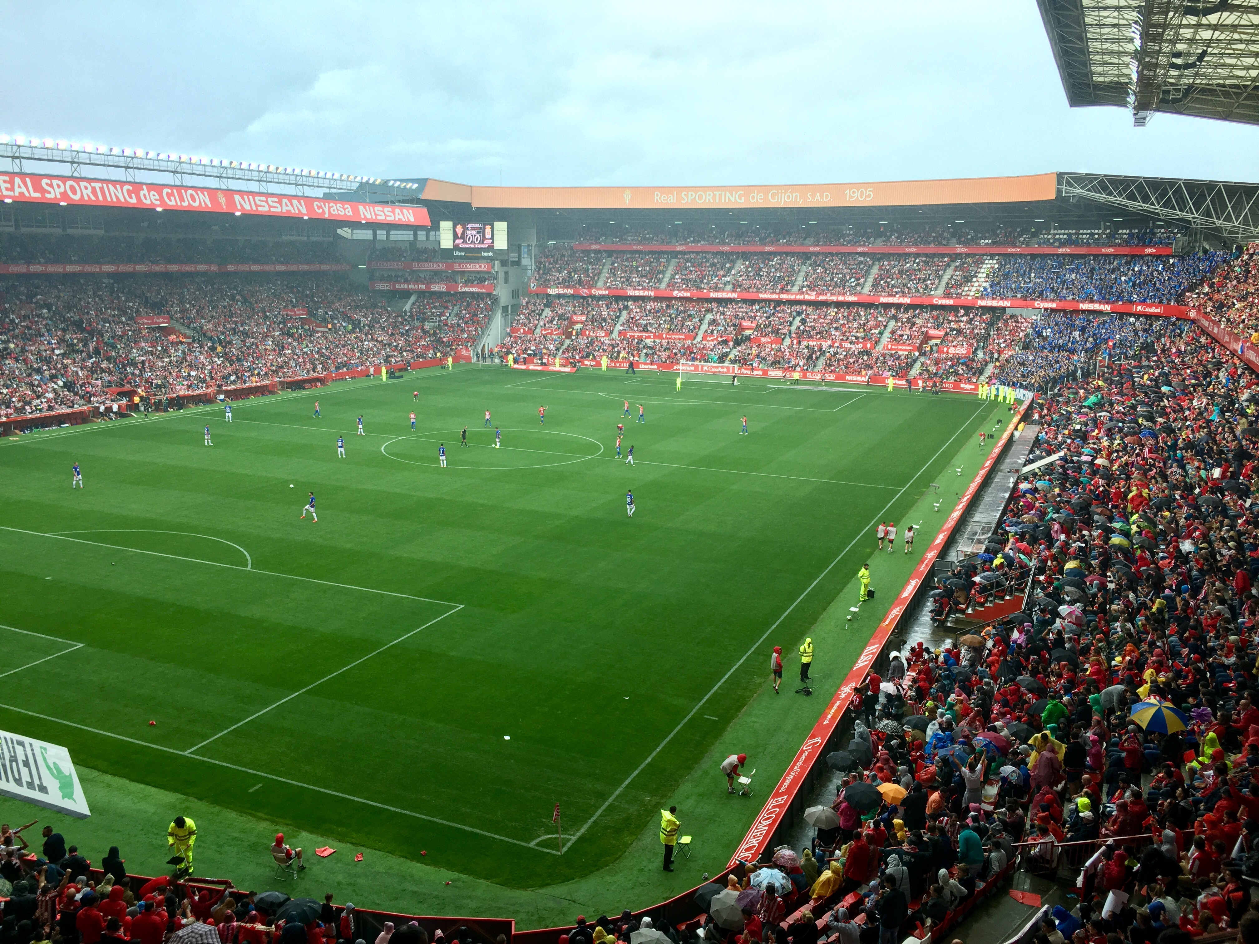 Primer Derbi asturiano catorce años después.